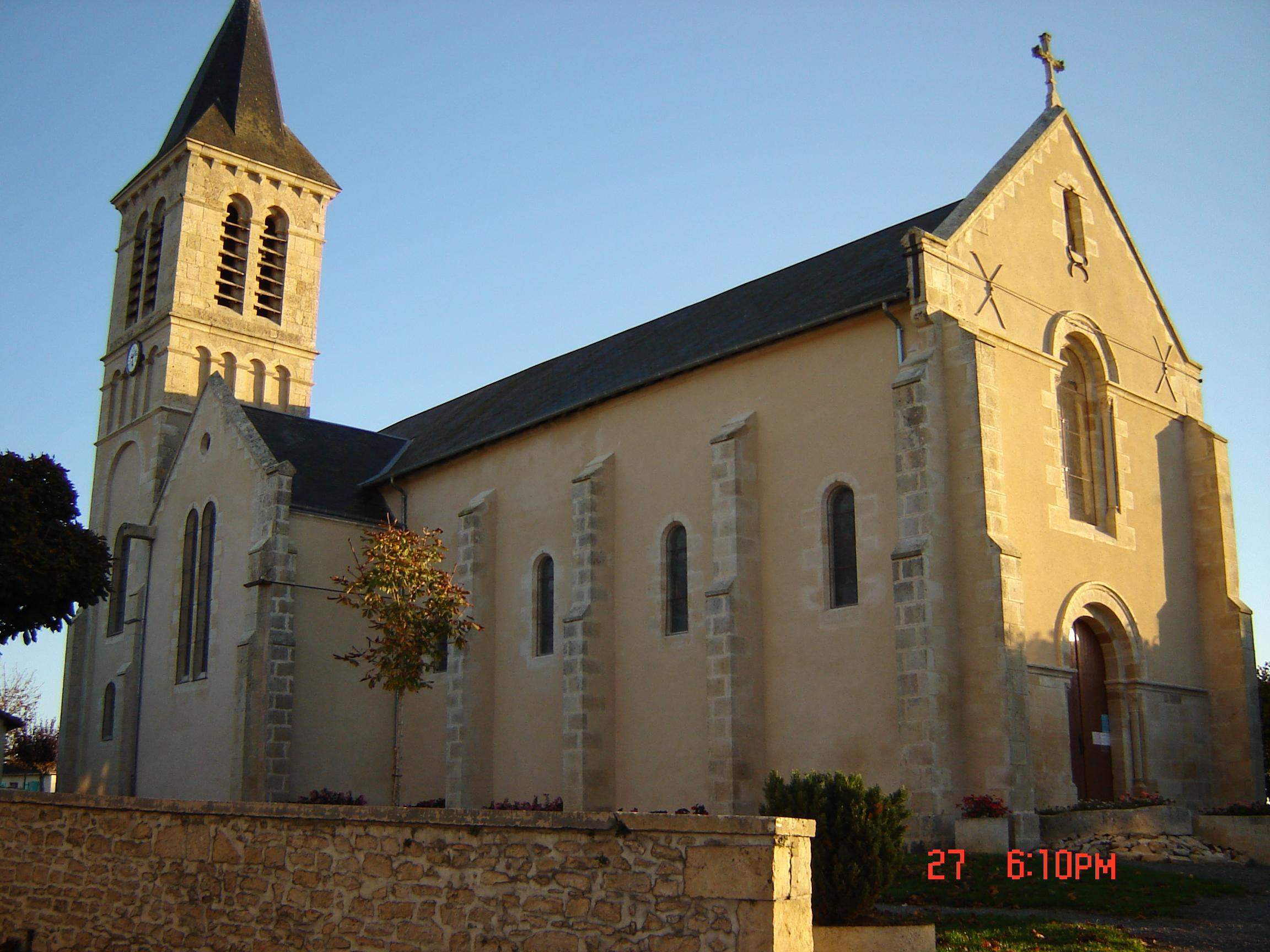 Eglise de Pleuville